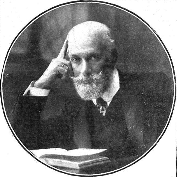 Retrato de Armando Palacio Valdés, fotografía de Manuel Compañy recogida en la revista española Mundo Gráfico.